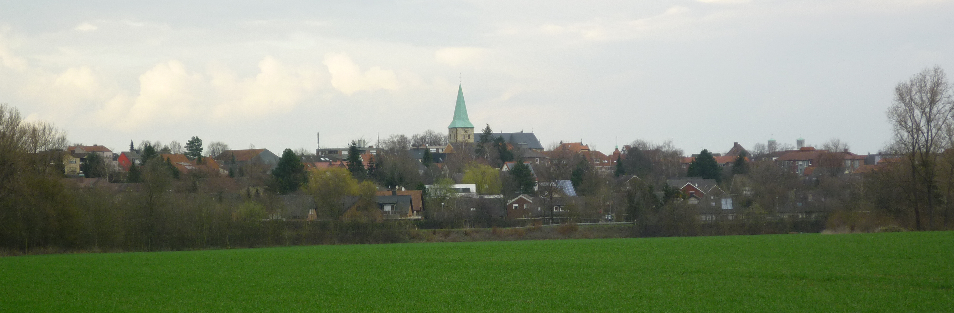 Panoramablick auf Ennigerloh aus südöstlicher Richtung